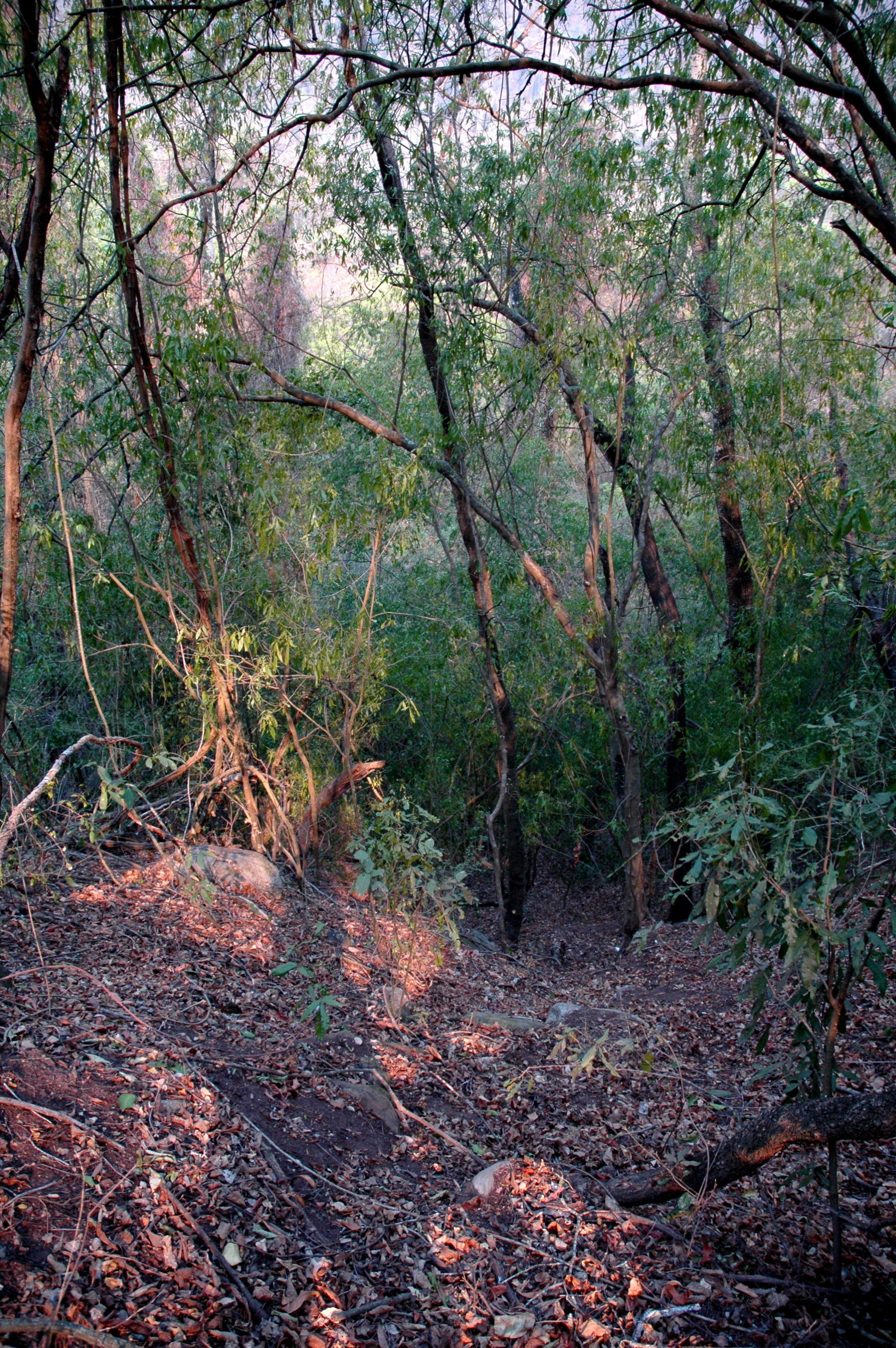 Parque Nacional Calilegua, Jujuy.